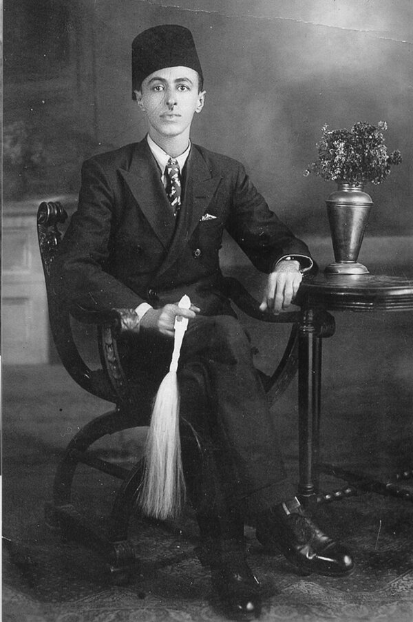 الاديب حسين سرحان العتيبي في رحلة الى الخارج